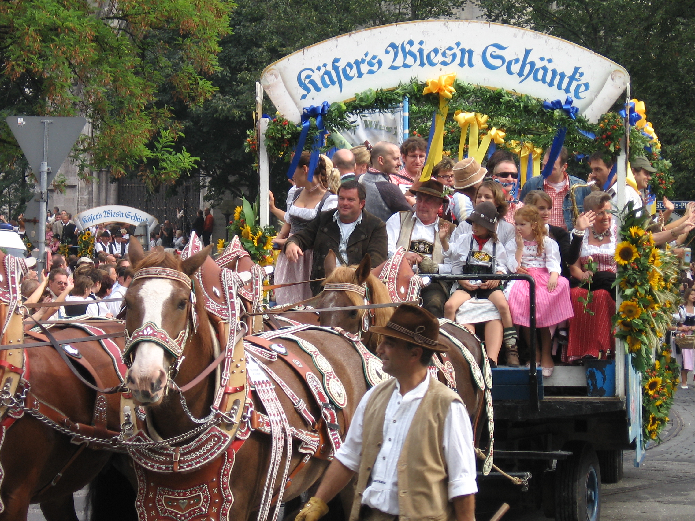 Oktoberfest - Deschidere festivǎ.